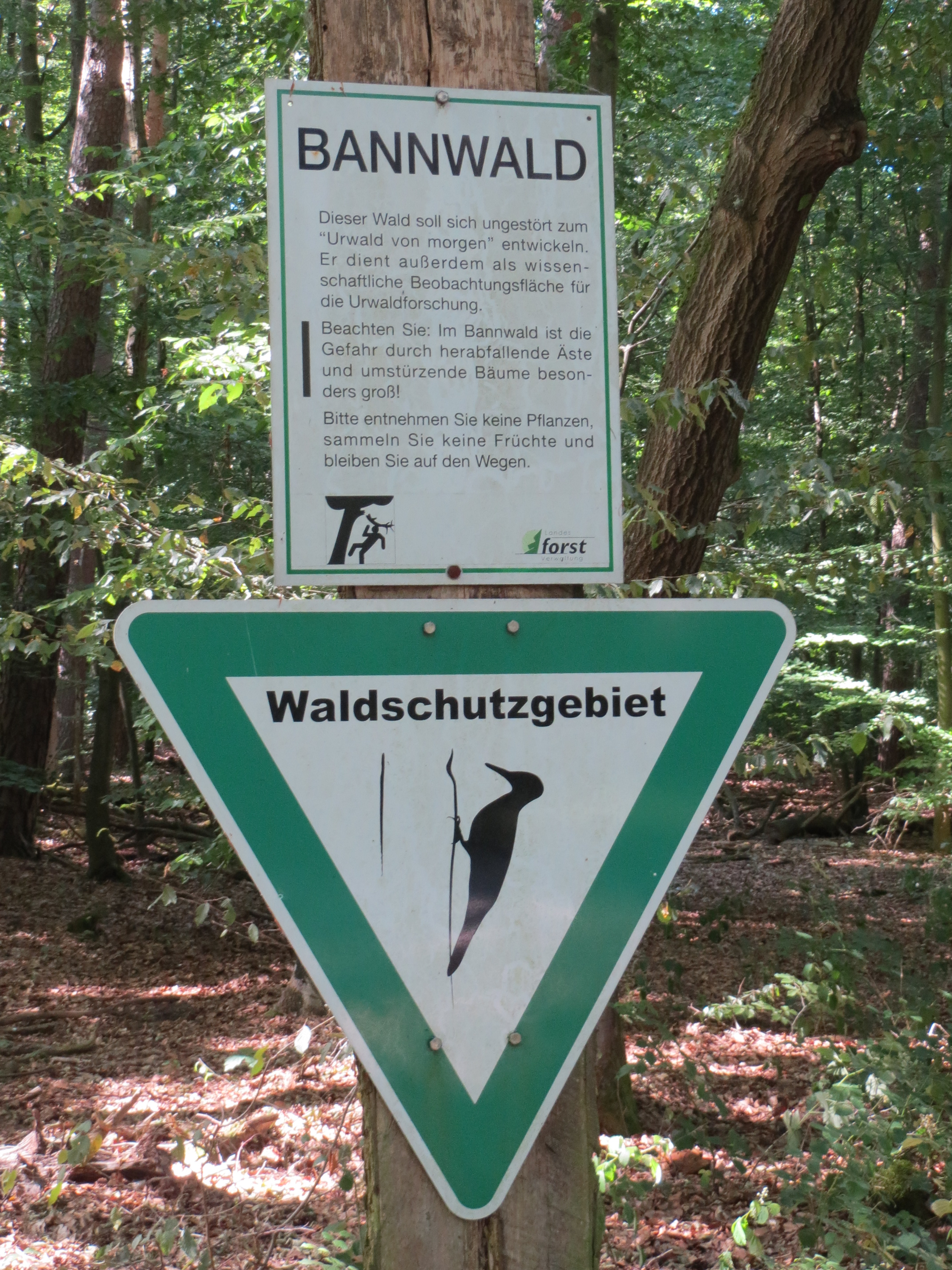 Schilder Bannwald und Waldschutzgebiet „Saubusch“ (Schwetzinger Hardt)